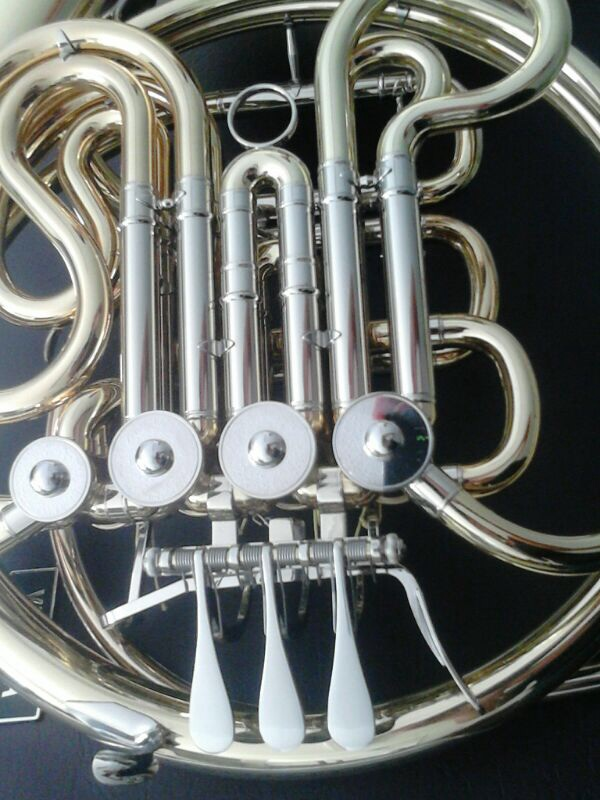 Aquest aparell es un instrument musical anomenat trompa. Te un so mol bonic i suau q al feia sonar val la pena escoltarla. Esta composta per una campana, uns pistons q serveixen per tocar diferents notes i doble Cór q es per poder tocar dos tipus de trompes diferents.